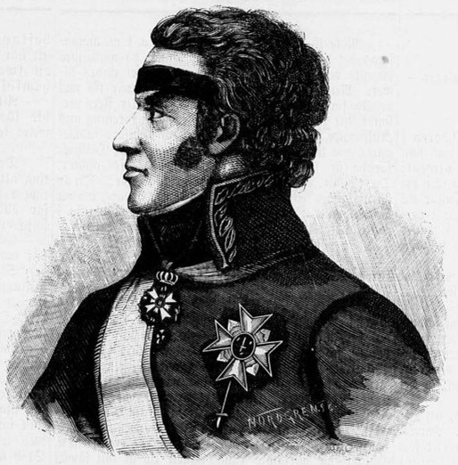 Xylografi av general von Döbeln.